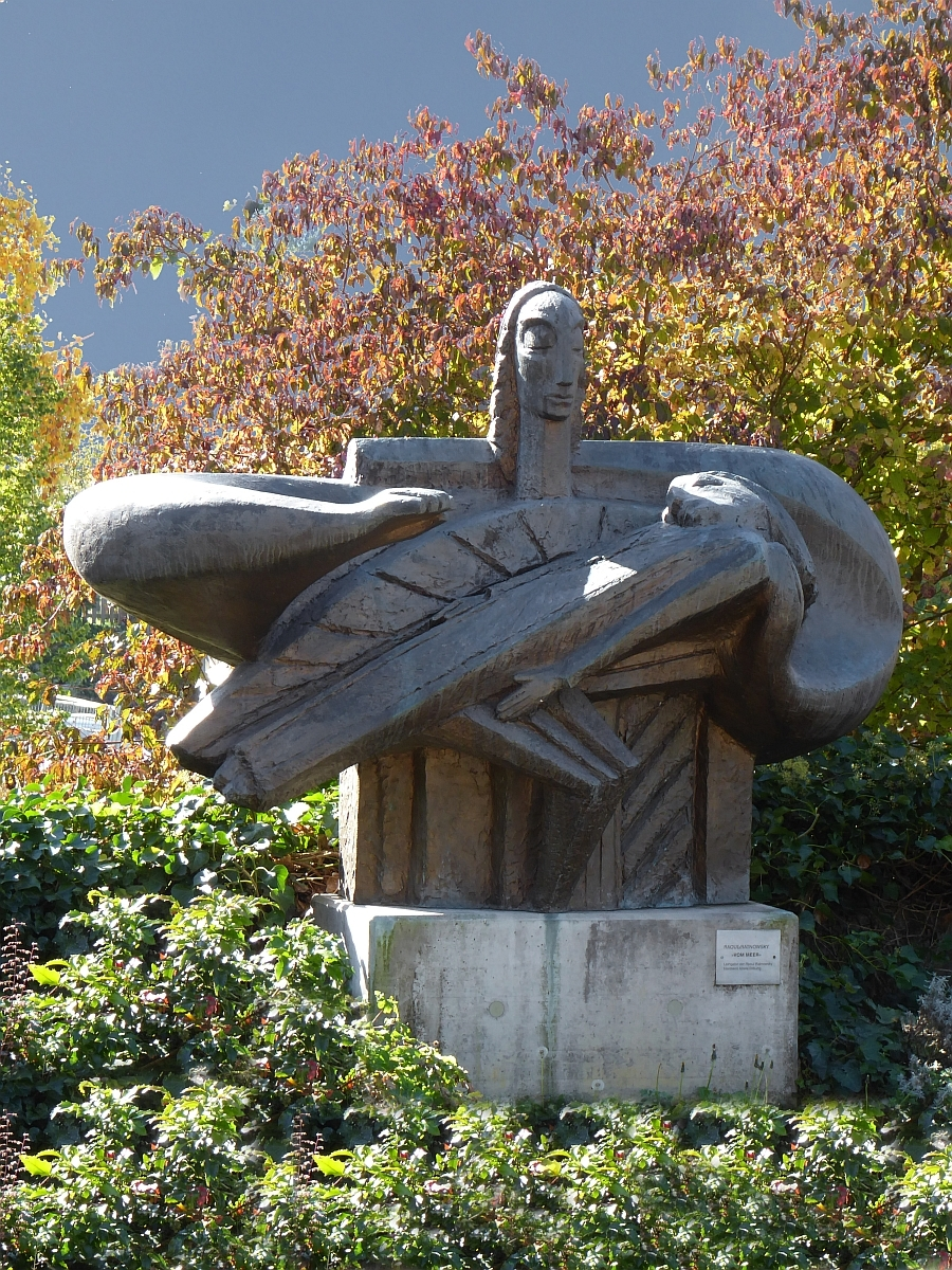 Raoul Ratnowsky (1912–199) Bildhauer, Skulptur (vom Meer) auf dem Friedhof von Dornach, Solothurn